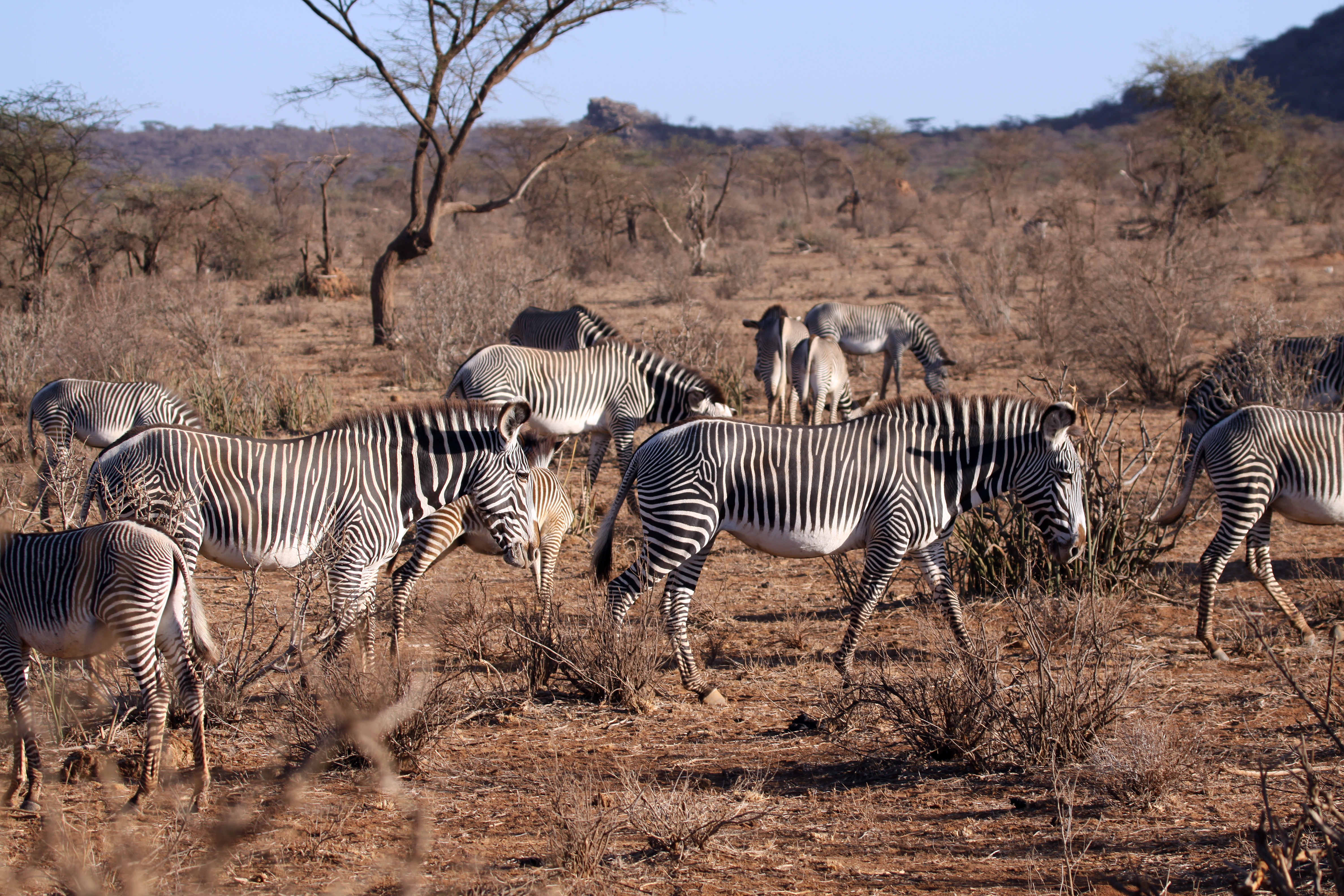 Zèbres de Grévy - Samburu